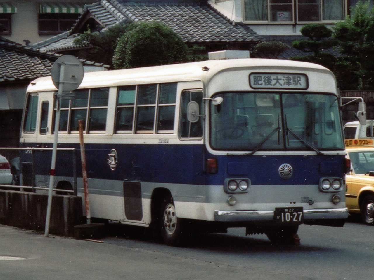 JR Kyushu Bus 334-9414 Mitsubishi K-MK115H at Yamaga Branch